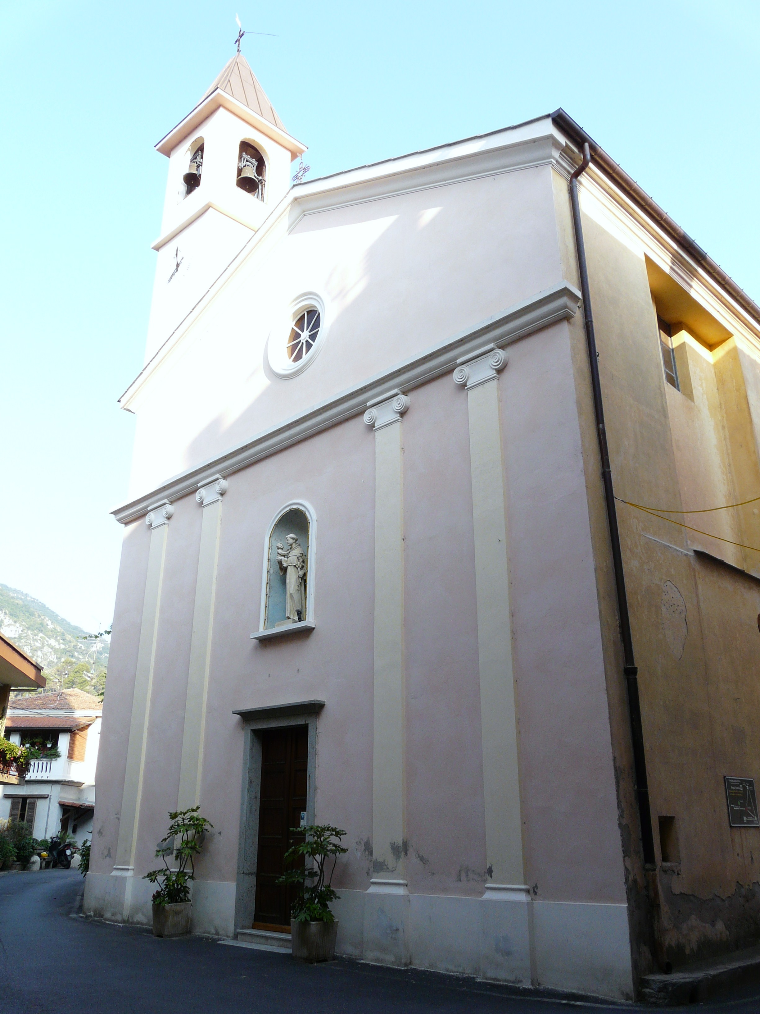 Chiesa di Sant'Antonio da Padova di Olivetta San Michele, Liguria, Italia.